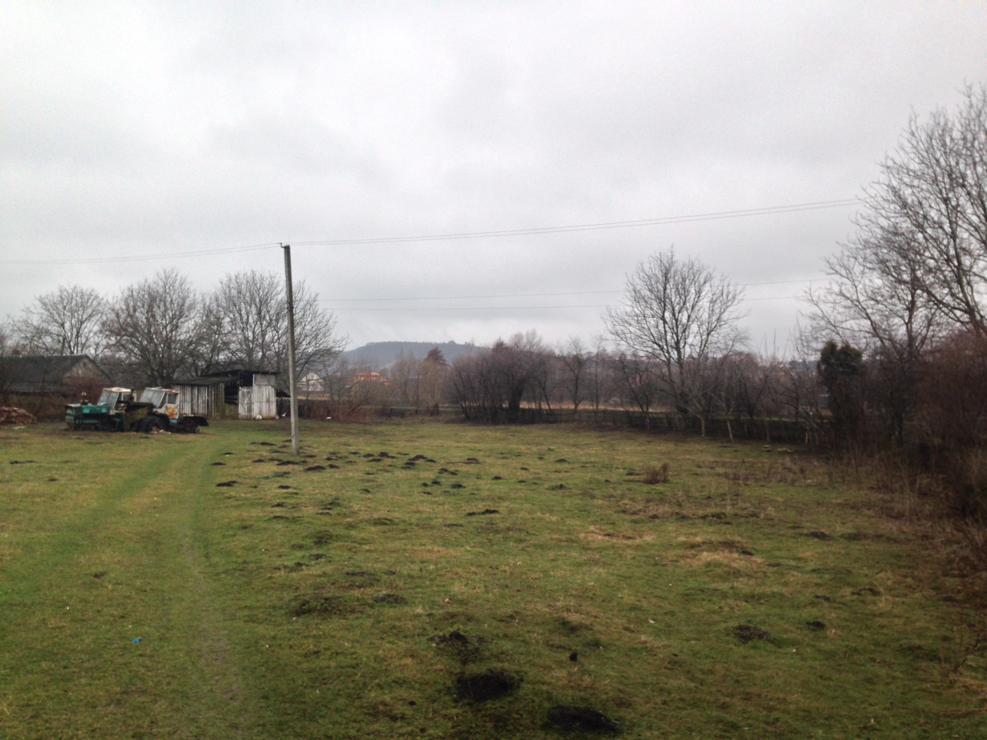 תמונה של שדה בו היה ממוקם בית הקברות היהודי של Nowe Miasto